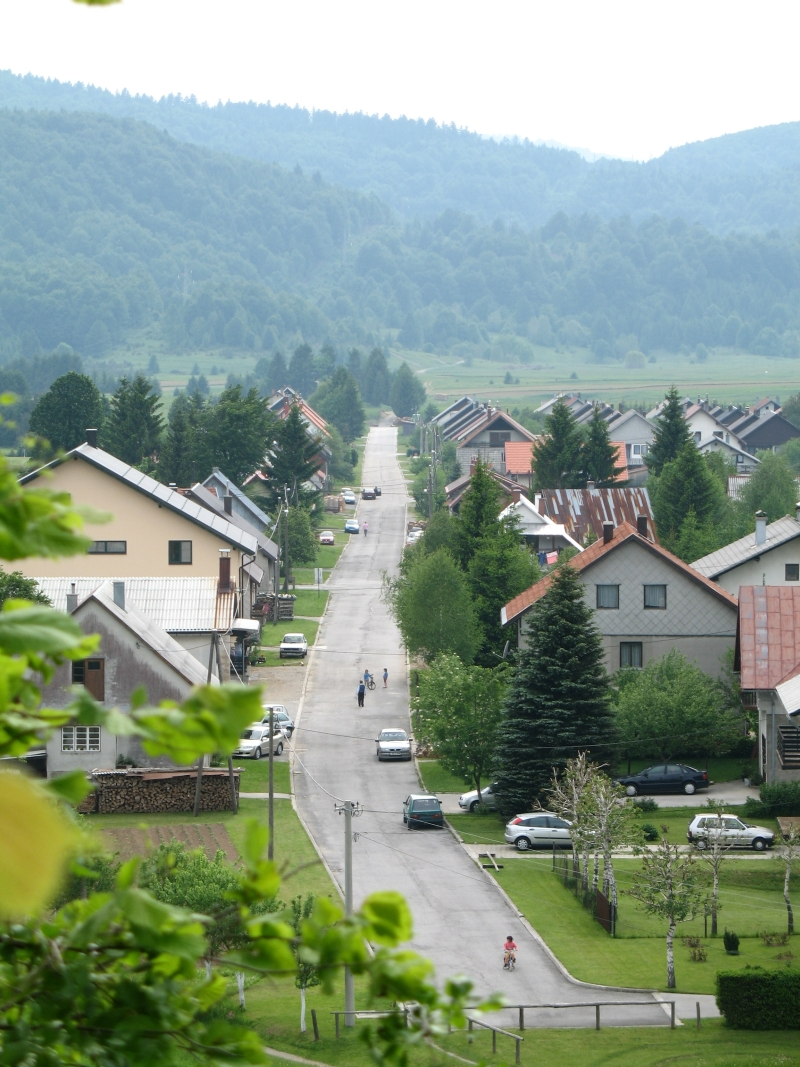 Pogled na dio Ravne Gore